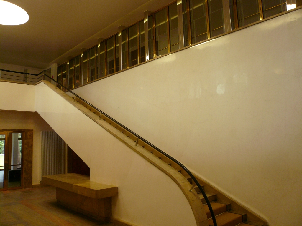 Haus K. in O. -Villa Reemtsma - in Hamburg Othmarschen: Halle